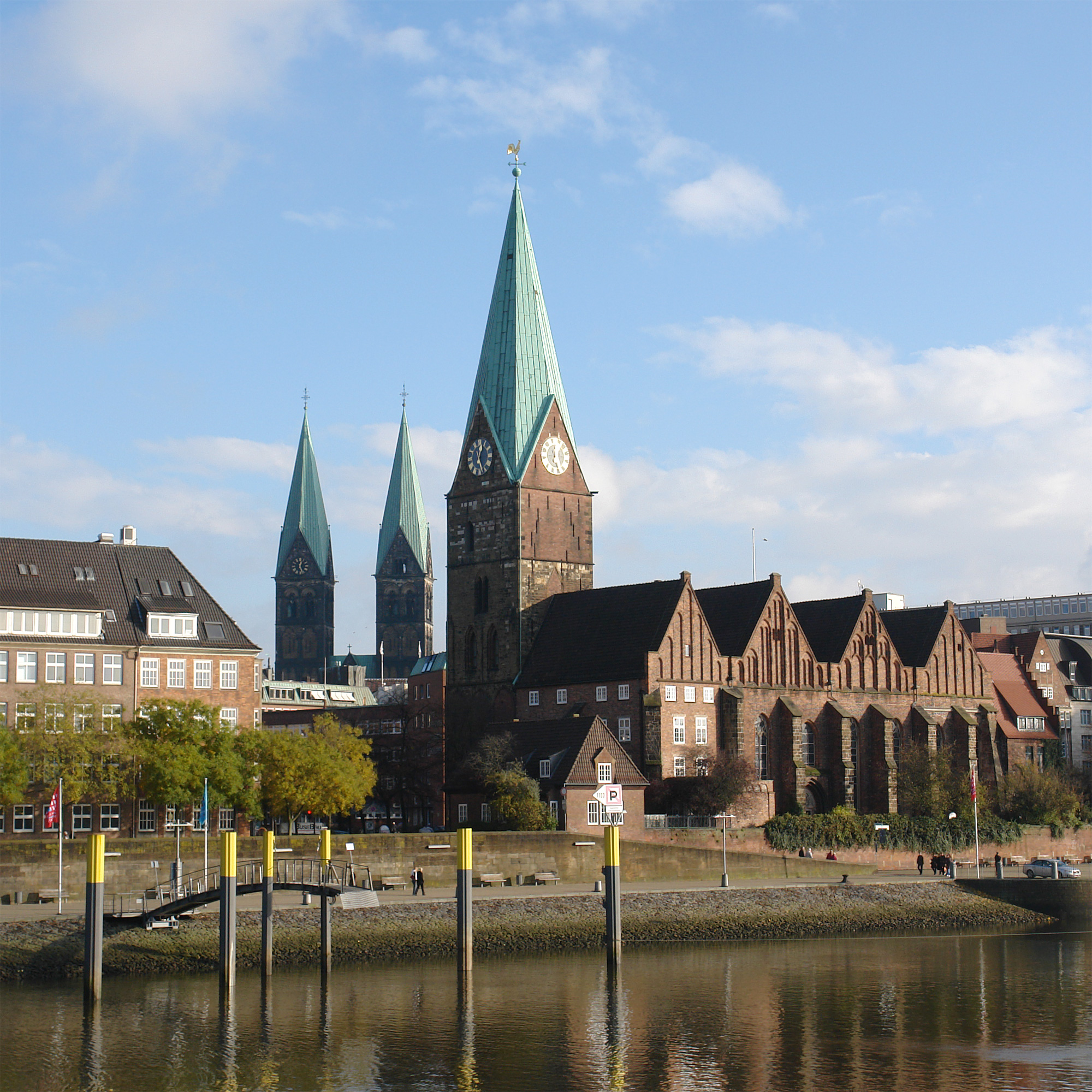 St.Martini-Kirche in Bremen, links die Türme des Bremer Dom